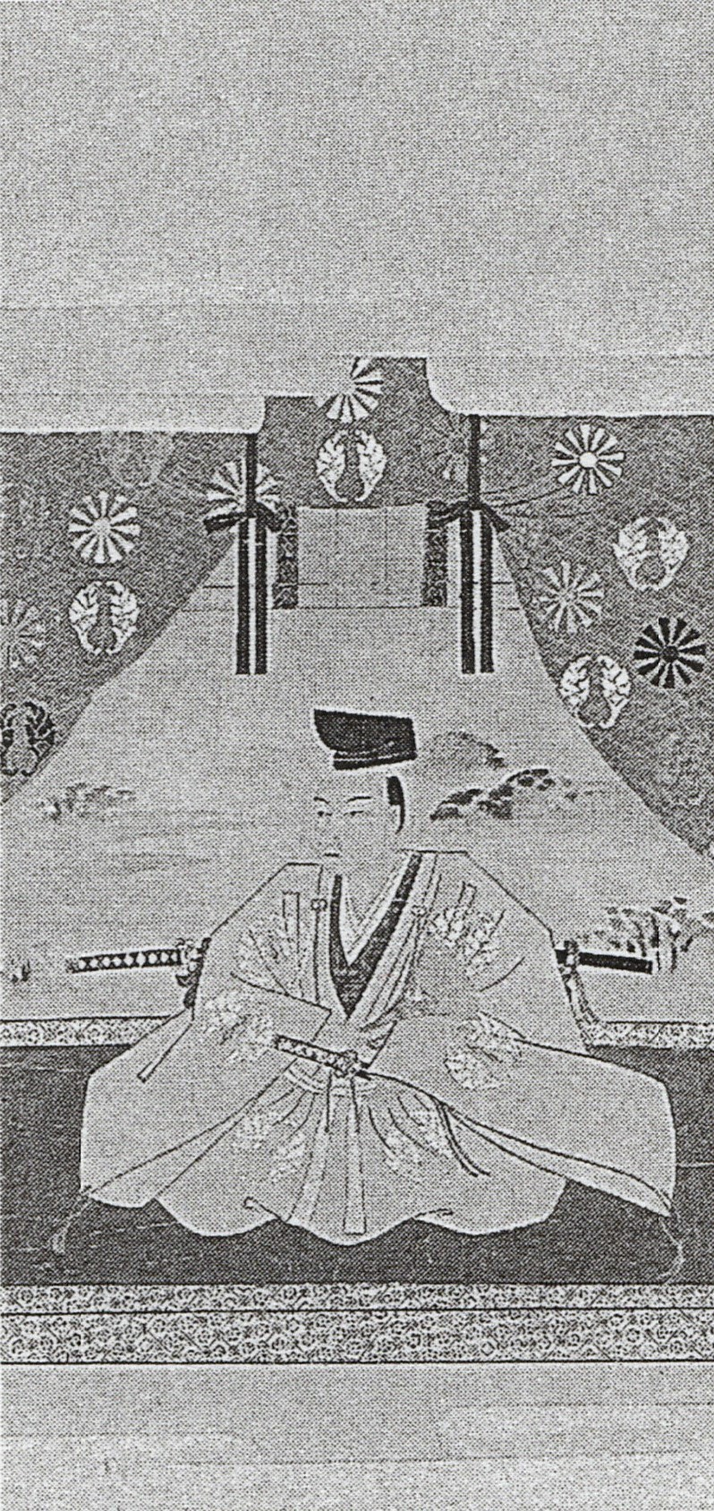 鍋島直寛の肖像(モノクロ)。